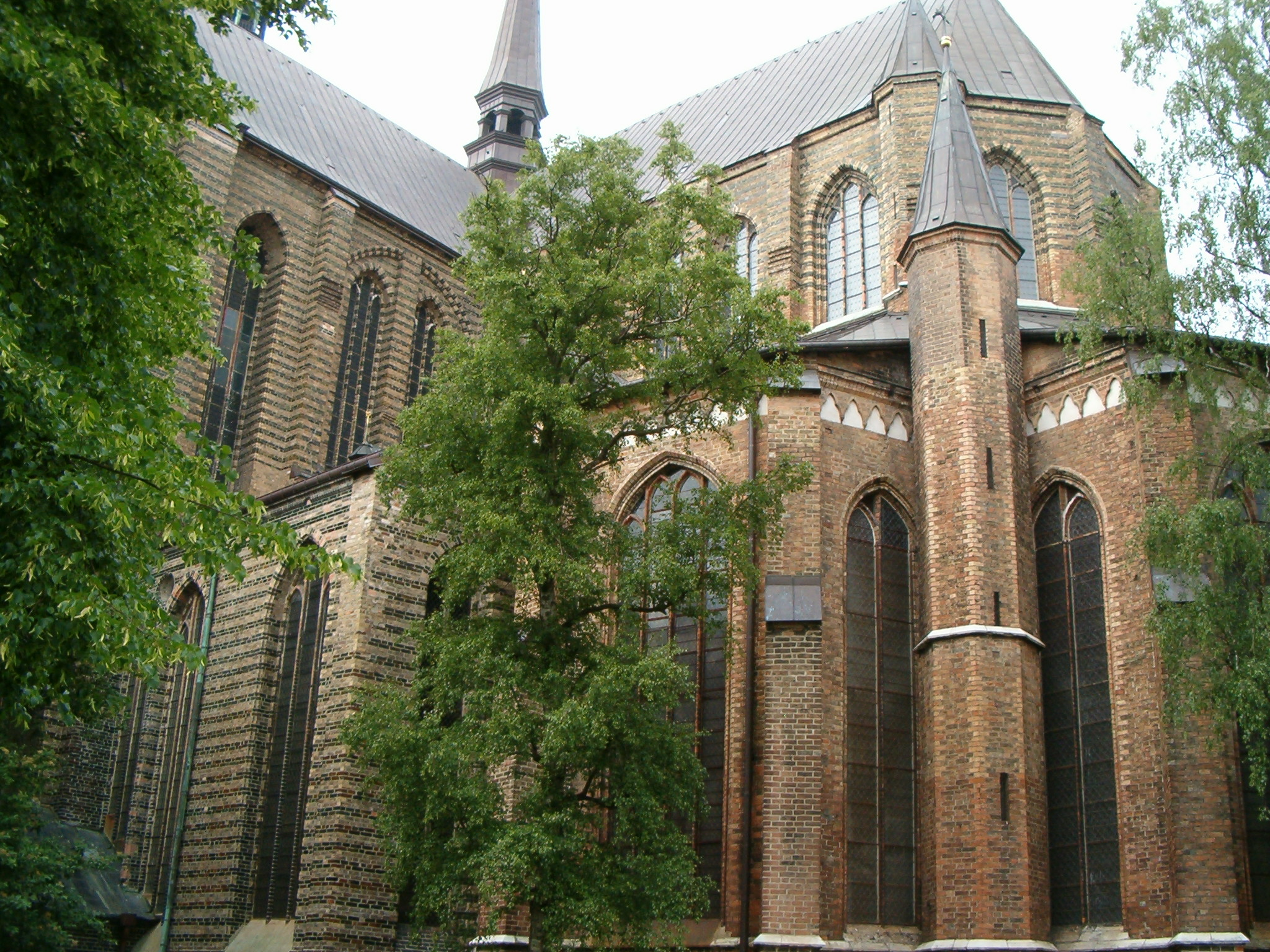 Choranlage der Rostocker Marienkirche